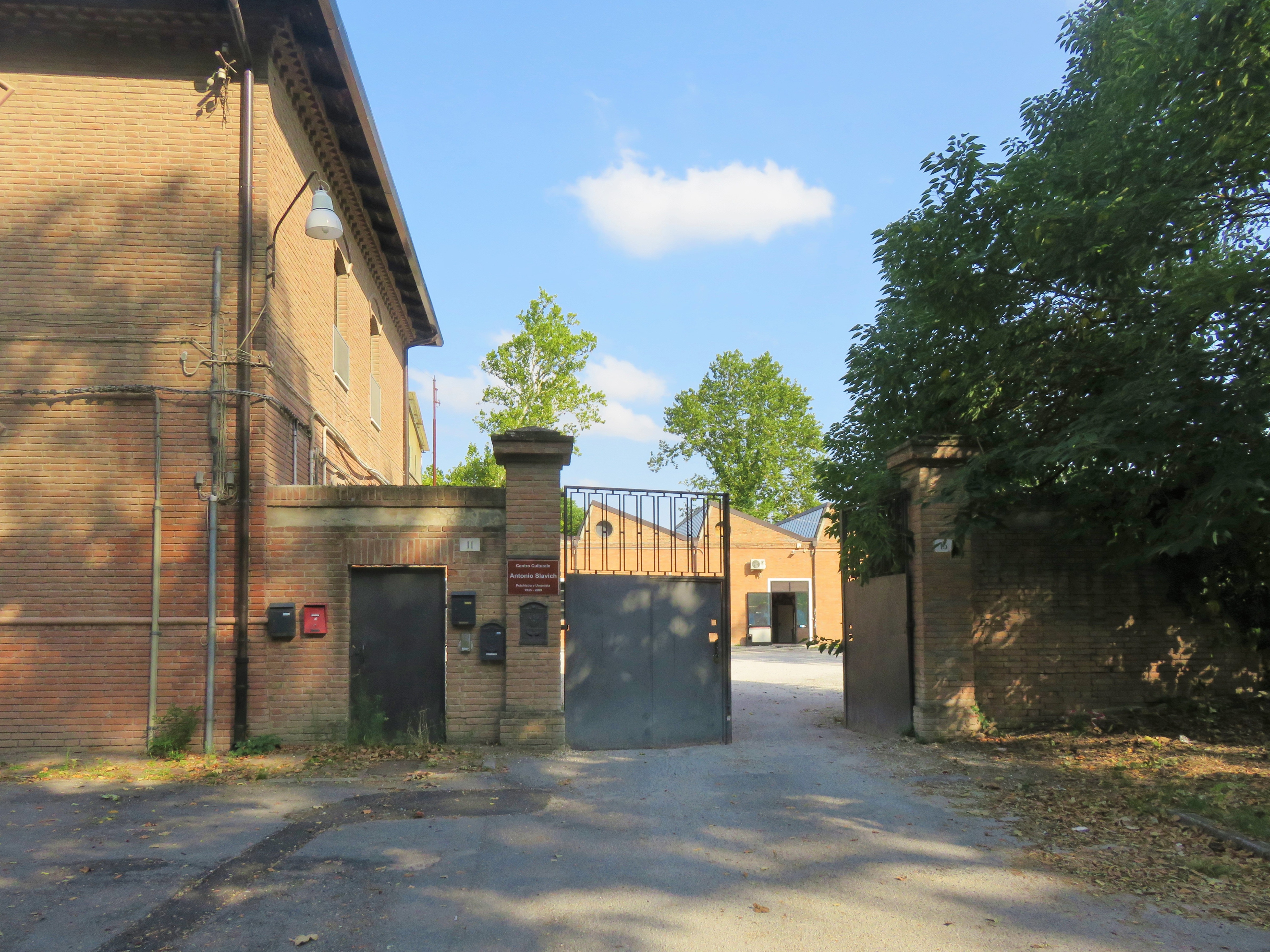 Centro culturale Antonio Slavich, sul Baluardo della Montagna, o montagnone, a Ferrara. Il centro ospita: Accademia Corale Vittore Veneziani, Musijam, Ferrara Off e Sonika